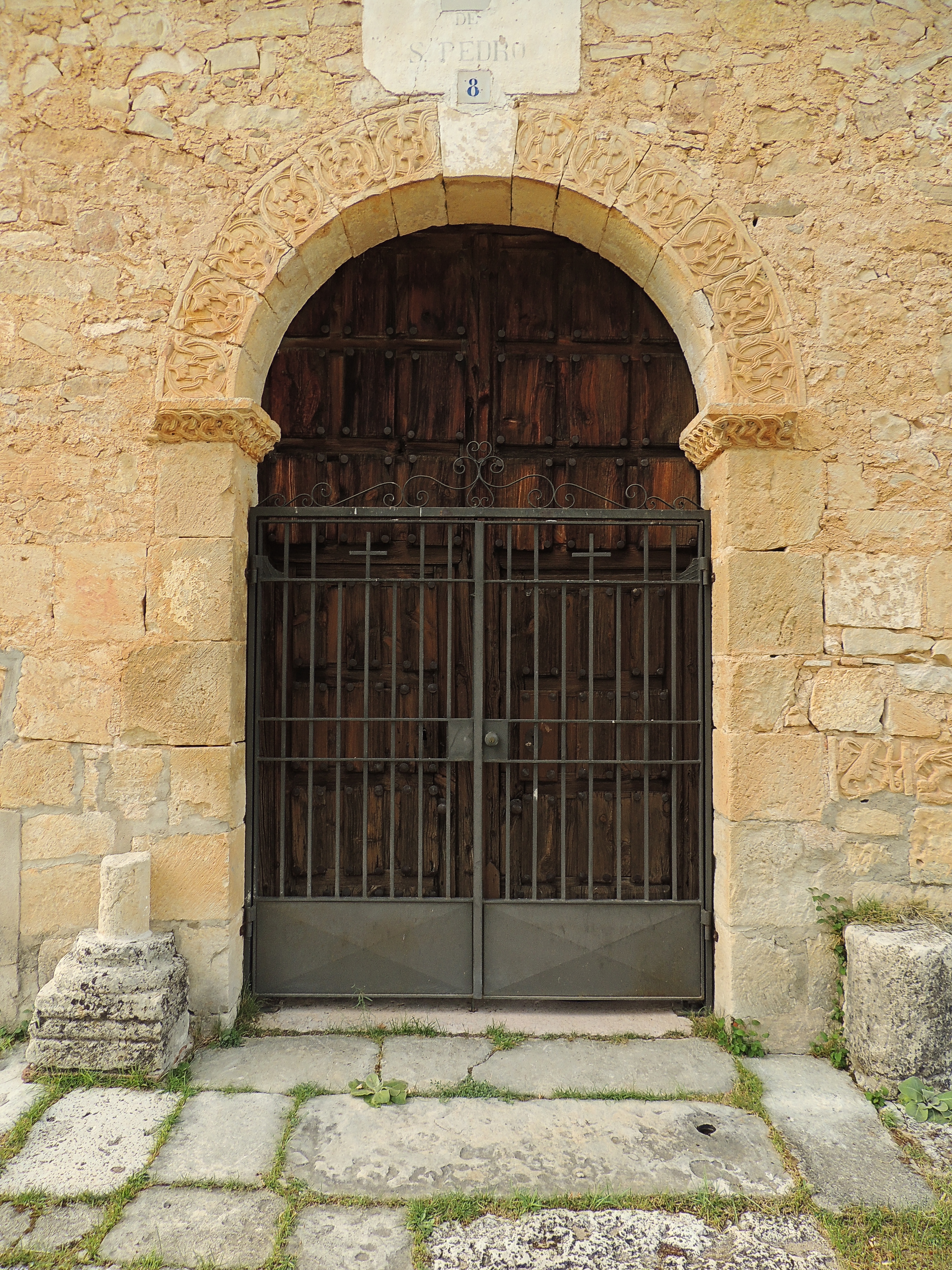 Portada